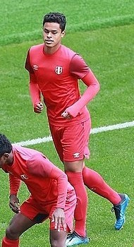 Christopher Robin Olivares Burga